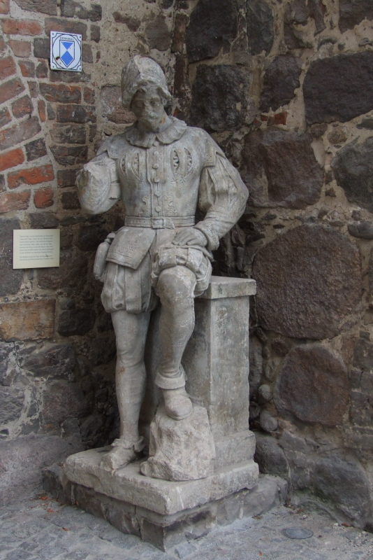 Auf der Burg Ziesar in Ziesar: Wächterfigur im Burgzugang